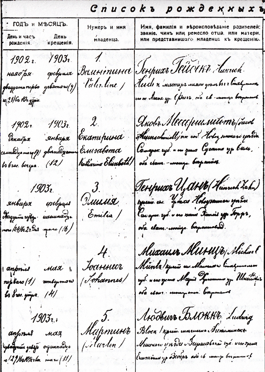 Список рождённых и крещённых в 1903 году из метрической книги колонии Иоганнесдорф Ставропольской губернии (Государственный архив Ставропольского края. Фонд № 303 (Евангелическо-лютеранский совет и лютеранская церковь города Ставрополя. Г. Ставрополь). Опись № 1 (Указы Московской евангелистско-лютеранской консистории, метрические свидетельства о рождении, крещении, бракосочетании, смерти и погребении прихожан г. Ставрополя, колоний Молочной и Золотарёвки, Довсунско-Иоганосгейском приходе, списки учащихся школ немецких колоний, списки конфирмованных прихожан). Дело № 3 (Список рождённых и крещённых Ставропольского на Кавказе Евангелического-лютеранского прихода). Лист 2)